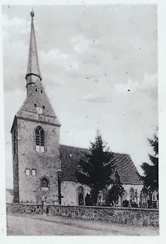 Die Dorfkirche Schlalach in der Gemeinde Mühlenfließ ist eine im Kern spätgotische Feldsteinkirche im Landkreis Potsdam-Mittelmark in Brandenburg. Im Innern steht unter anderem ein Schnitzaltar aus dem dritten Viertel des 15. Jahrhunderts. Aufnahme auf einer öffentlich zugänglichen Informationssäule des Naturparkzentrums Hoher Fläming an der Kirche.